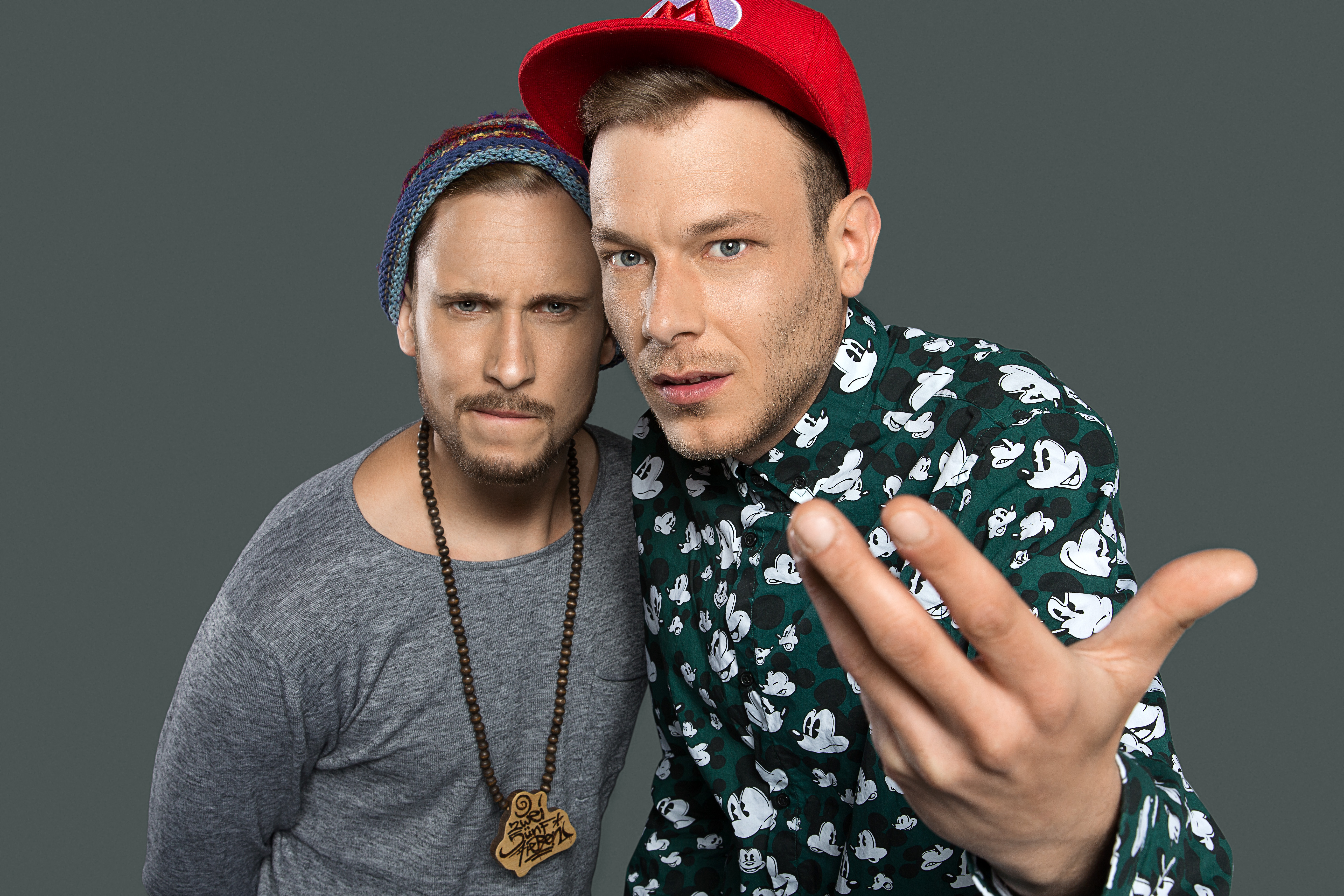 Pressefoto 257ers